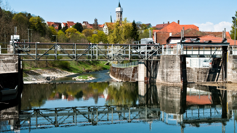 Wasserkraftanlage am Neckar bei der ENRW